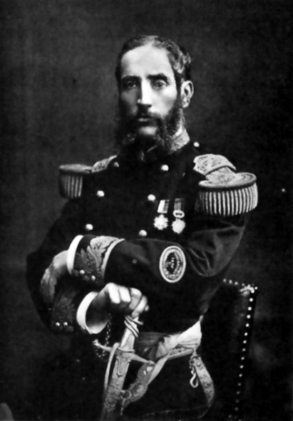 Mariscal Andrés Avelino Cáceres (1836-1923), héroe de la resistencia peruana contra la invasión chilena, y presidente de la República.